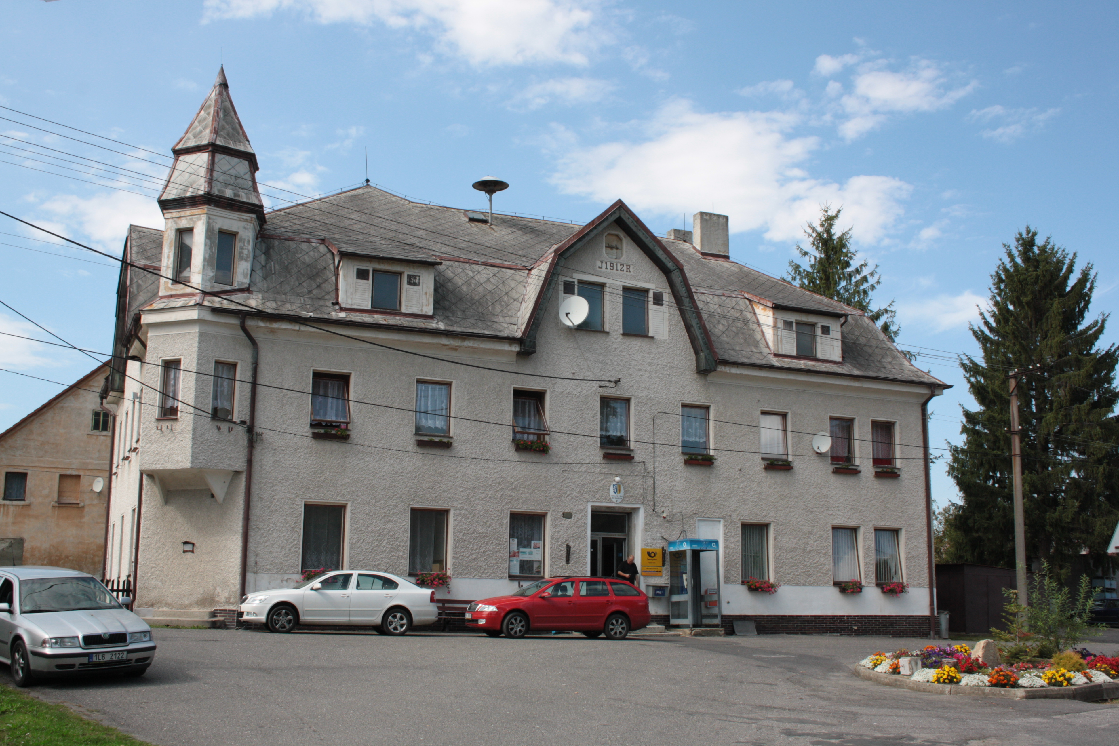 This photograph was taken with a DSLR from WMCZ's Camera grant. Obecní úřadv domě číslo popisné 101 v Bulovce v okrese Liberec.